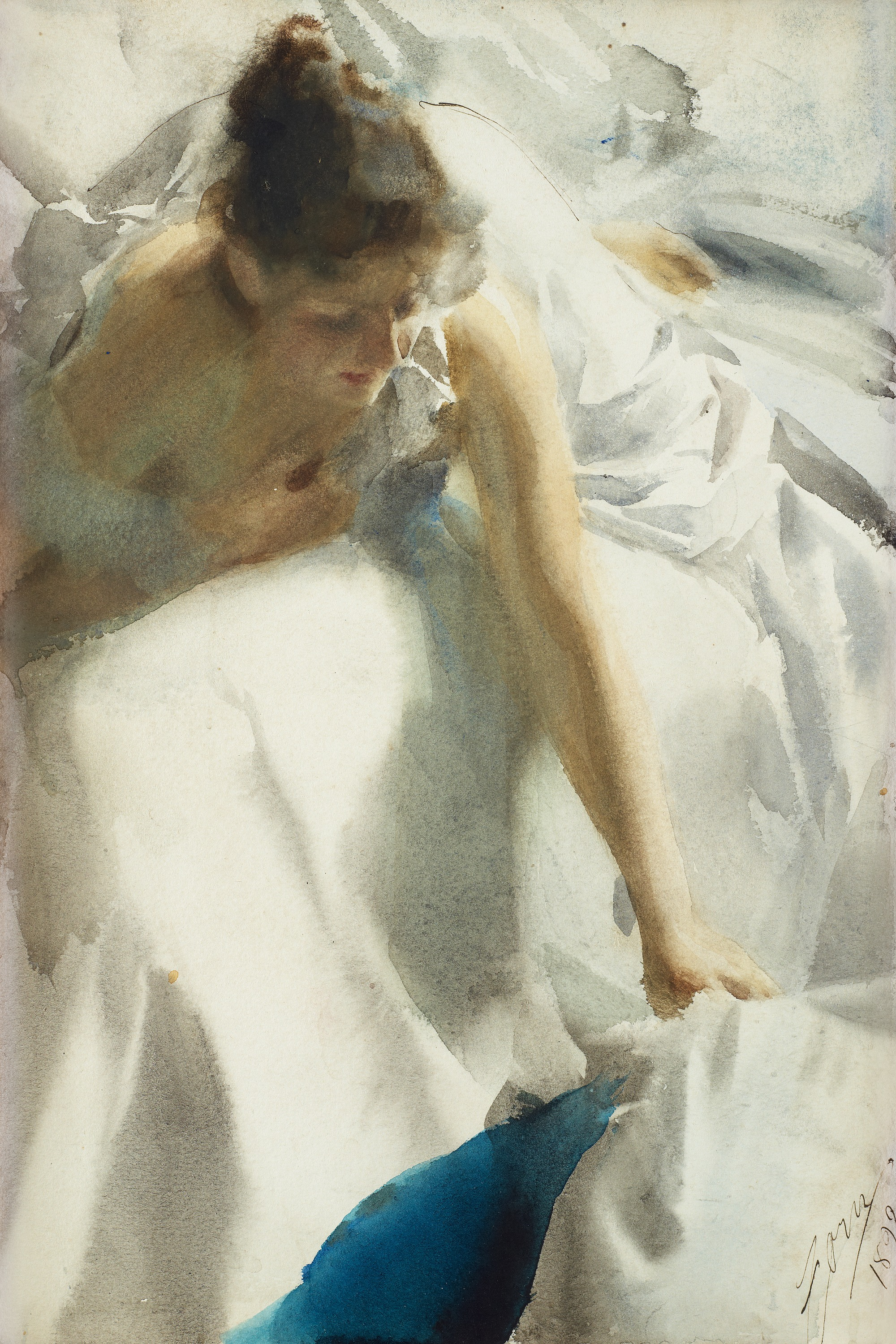 Reveil